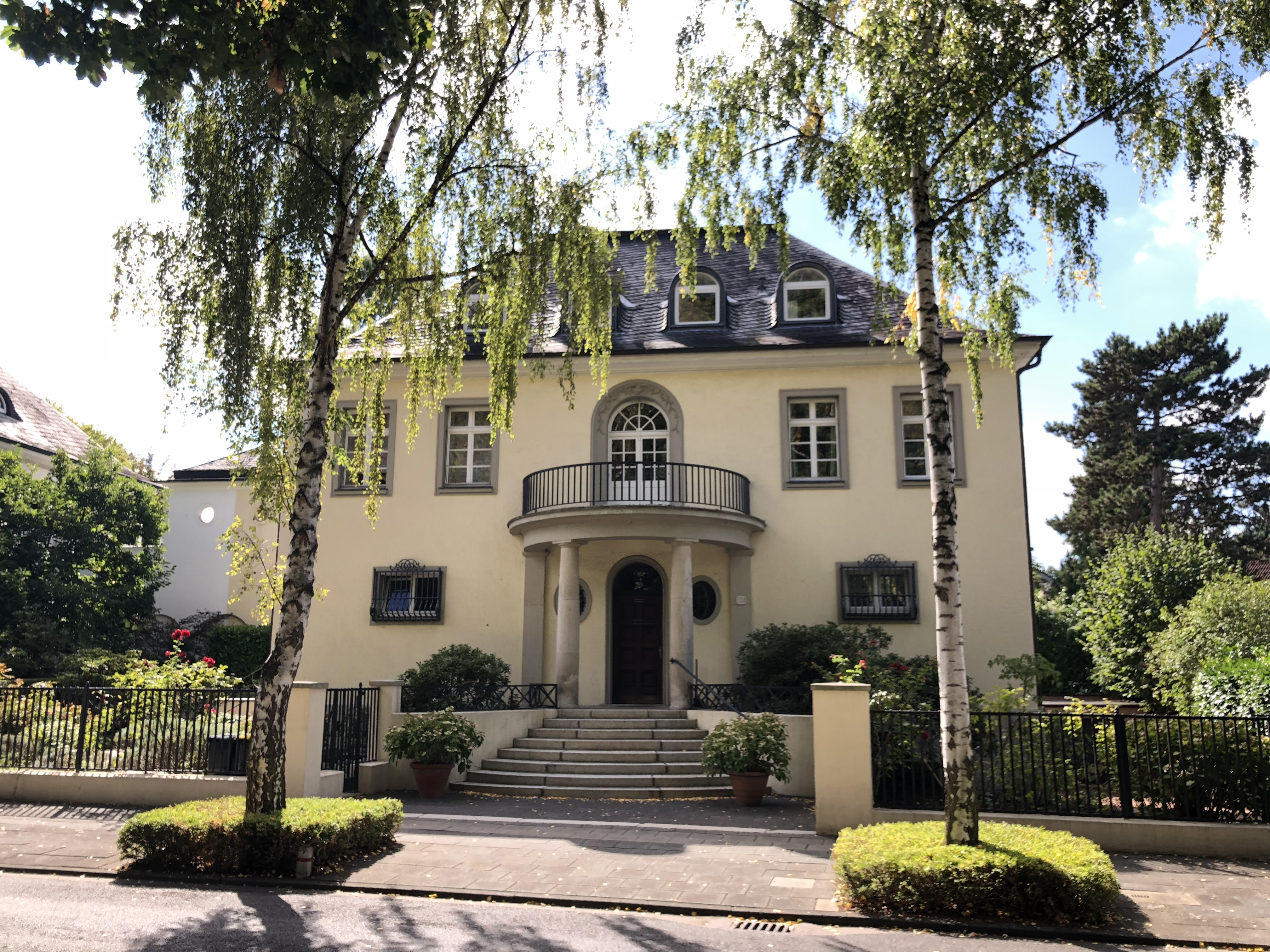 Wohnhaus, Am Südpark 51This is a photograph of an architectural monument.